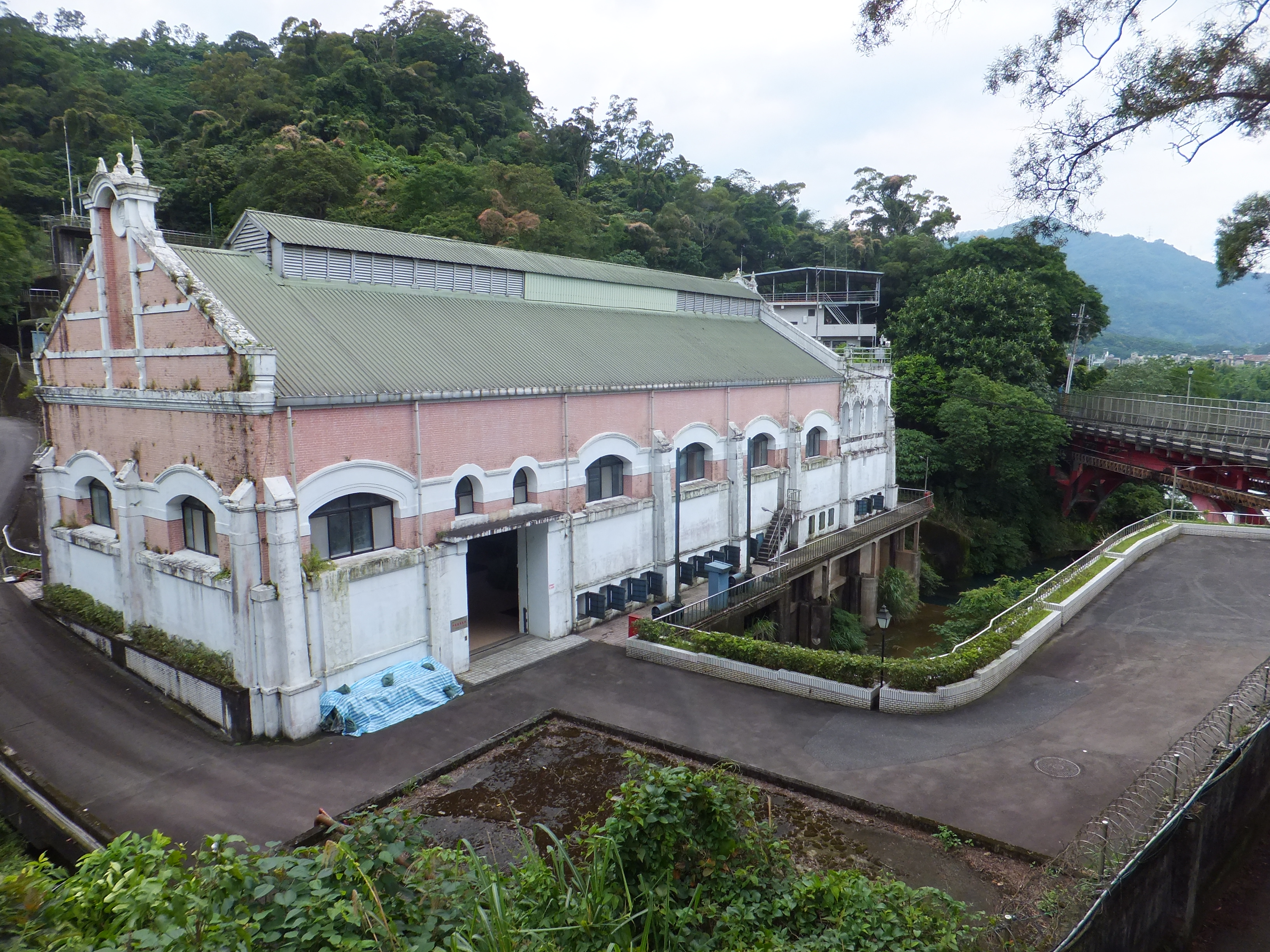 中文（台灣）: 小粗坑發電廠